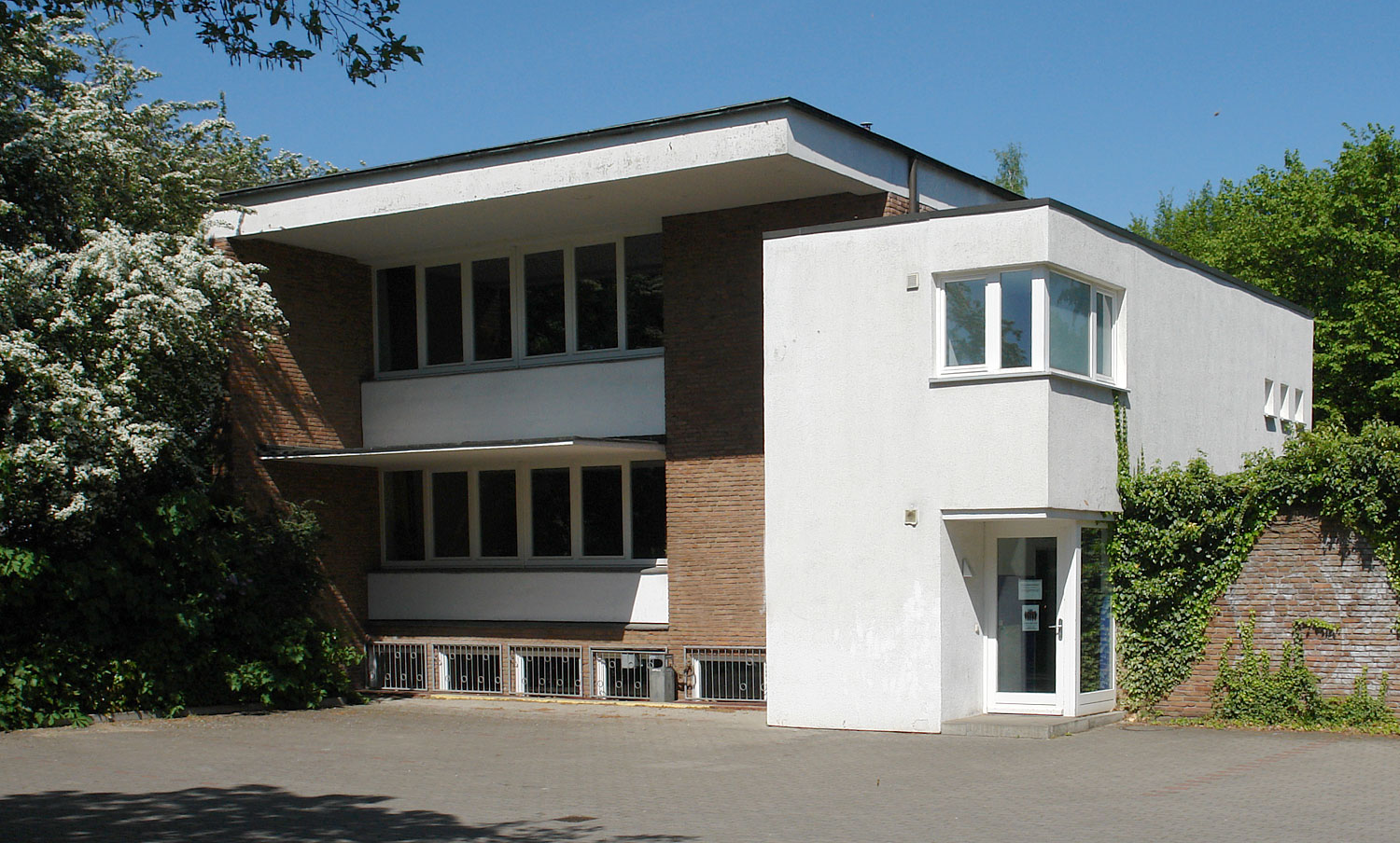 Kath. St.-Hedwig-Kirche der Pfarrgemeinde St. Raphael. Bremen, Kurt-Schumacher-Allee 62. Jugendhaus Das abgebildete Objekt ist ein geschütztes Kulturdenkmal in der Freien Hansestadt Bremen, mit der Nr. 0612 beim Landesamt für Denkmalpflege registriert.